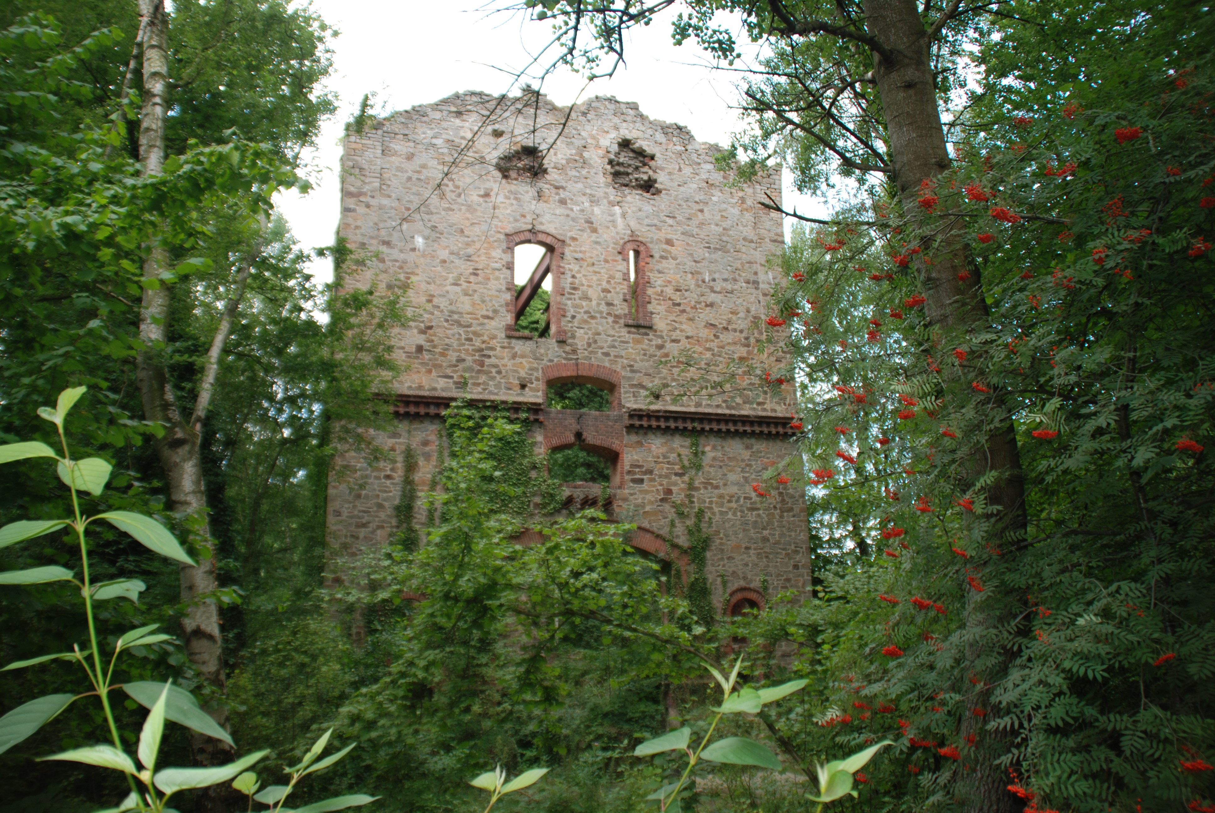 Stüveschacht heute